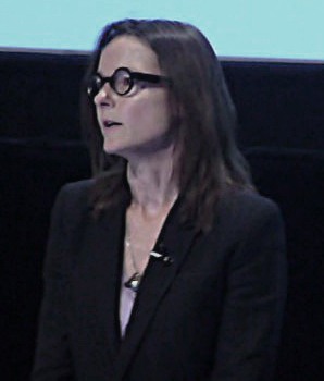 Ecrivain voyageur